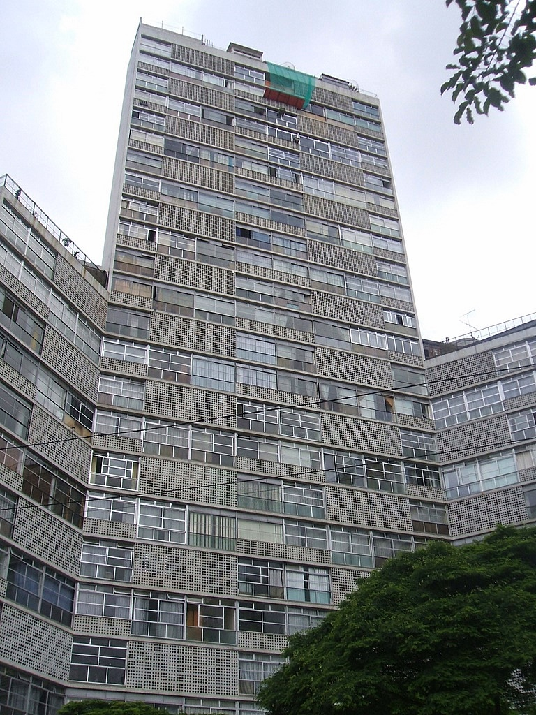 Edifício Eiffel, projeto de Oscar Niemeyer (1953); Praça da República, centro da cidade de São Paulo, Brasil.